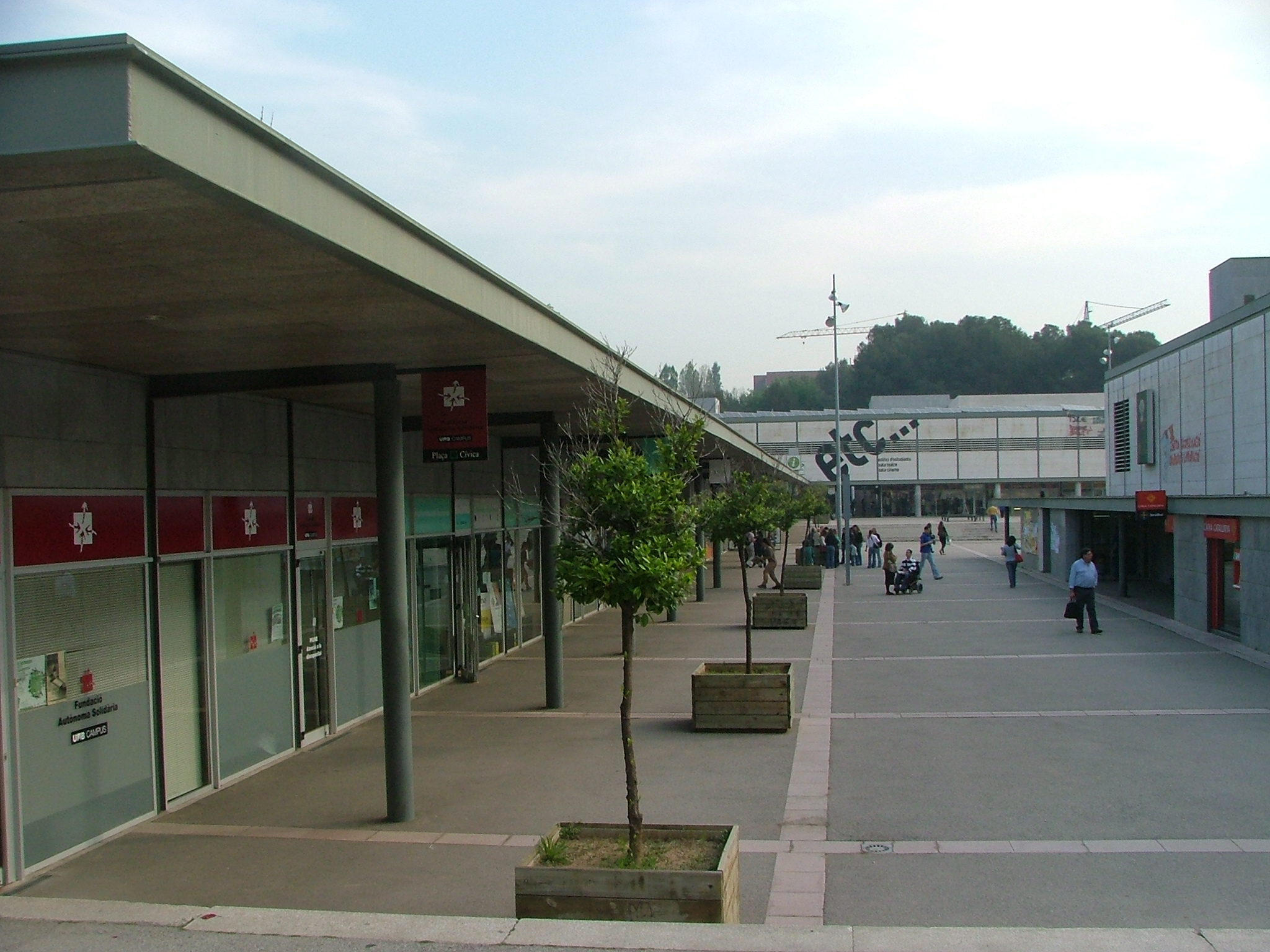 Plaça Cívica,UAB,Cerdanyola del Vallès,Barcelona,Catalonia,Spain